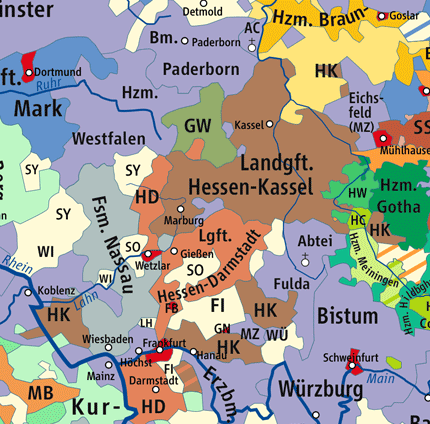 Karte Landgrafschaft Hessen-Kassel 1789 / Map of the Landgraviat Hesse-Cassel 1789, Ausschnitt aus